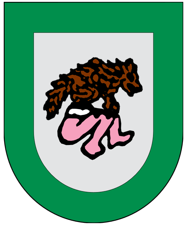 Escudo Coyotzingo